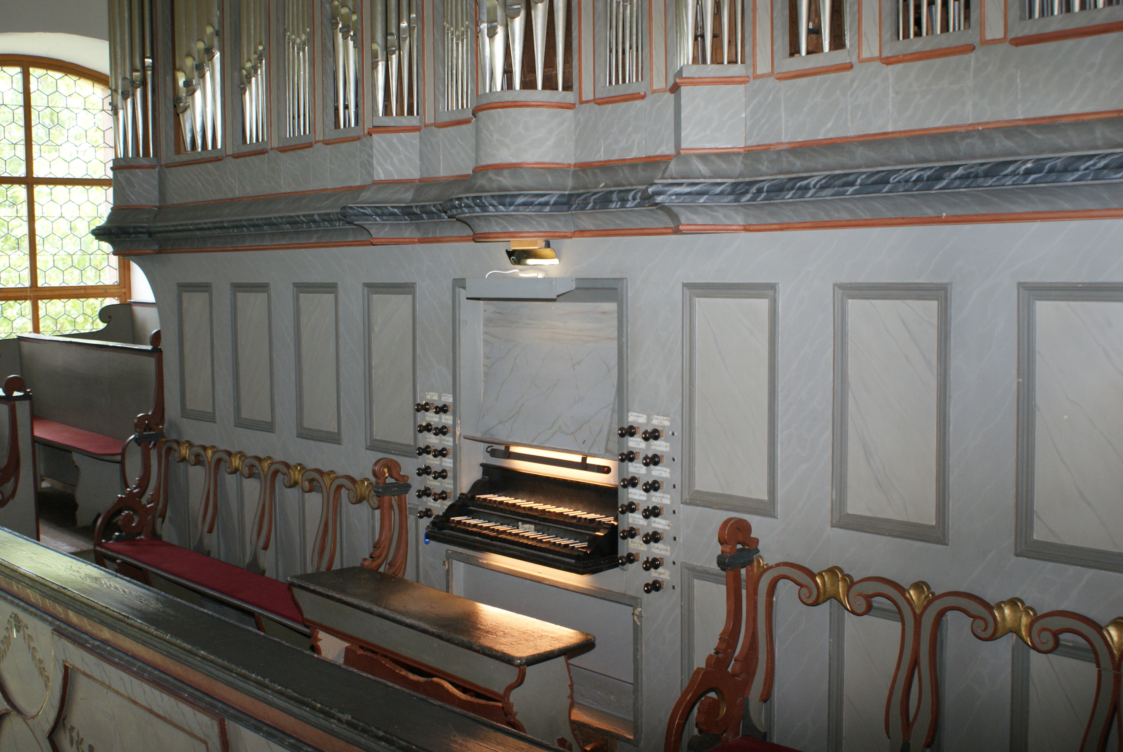 Untergehäuse der Orgel in der Evangelischen Kirche in Nieder-Moos, Hessen, Deutschland